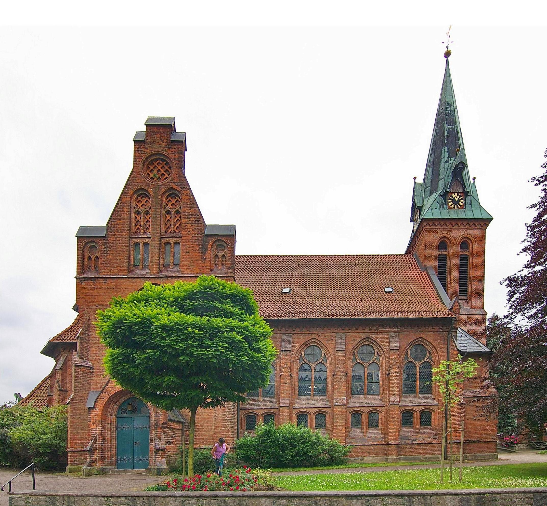 Lauenau, evangelische St.-Lukas-Kirche